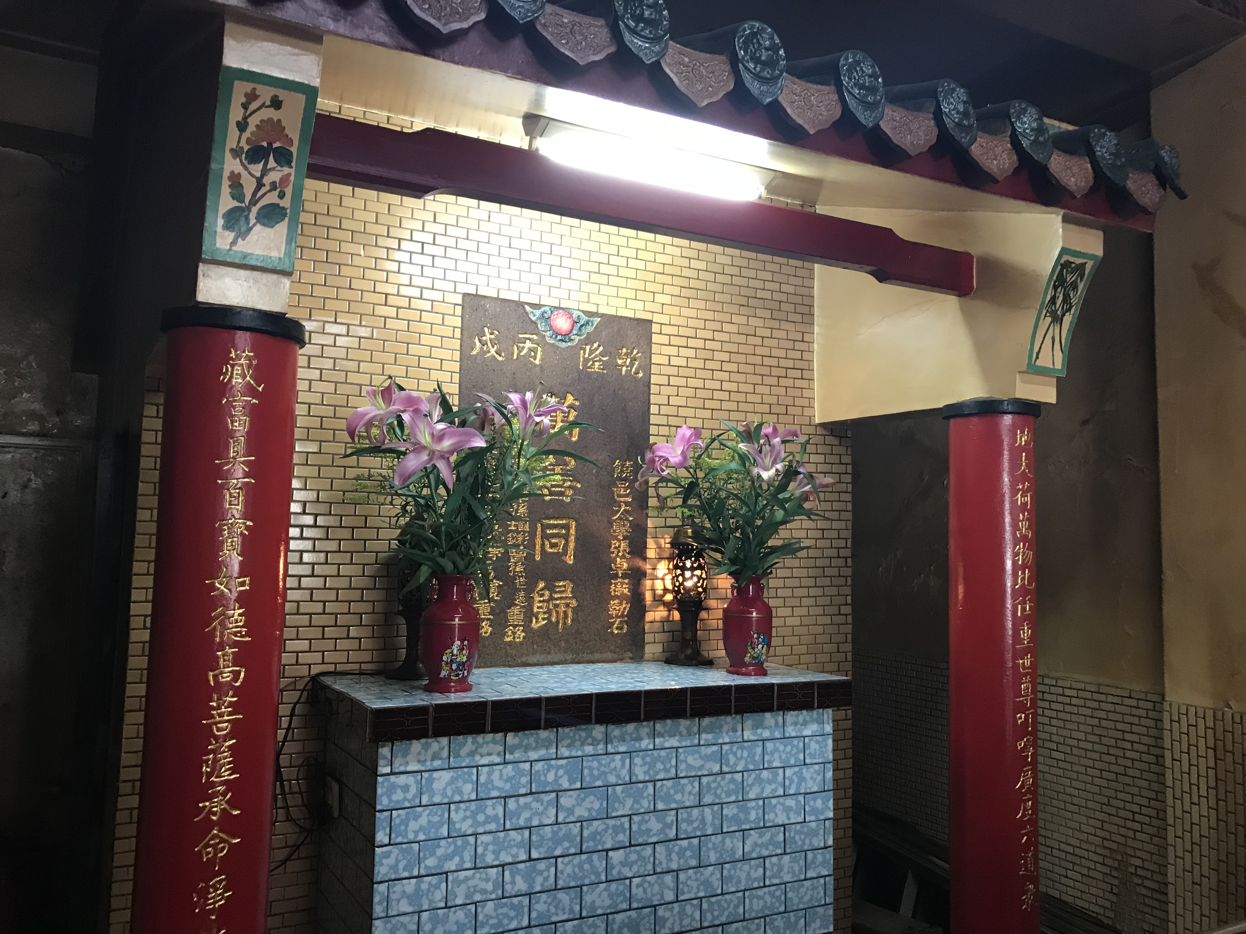 中文（台灣）: 員林地藏庵牌位